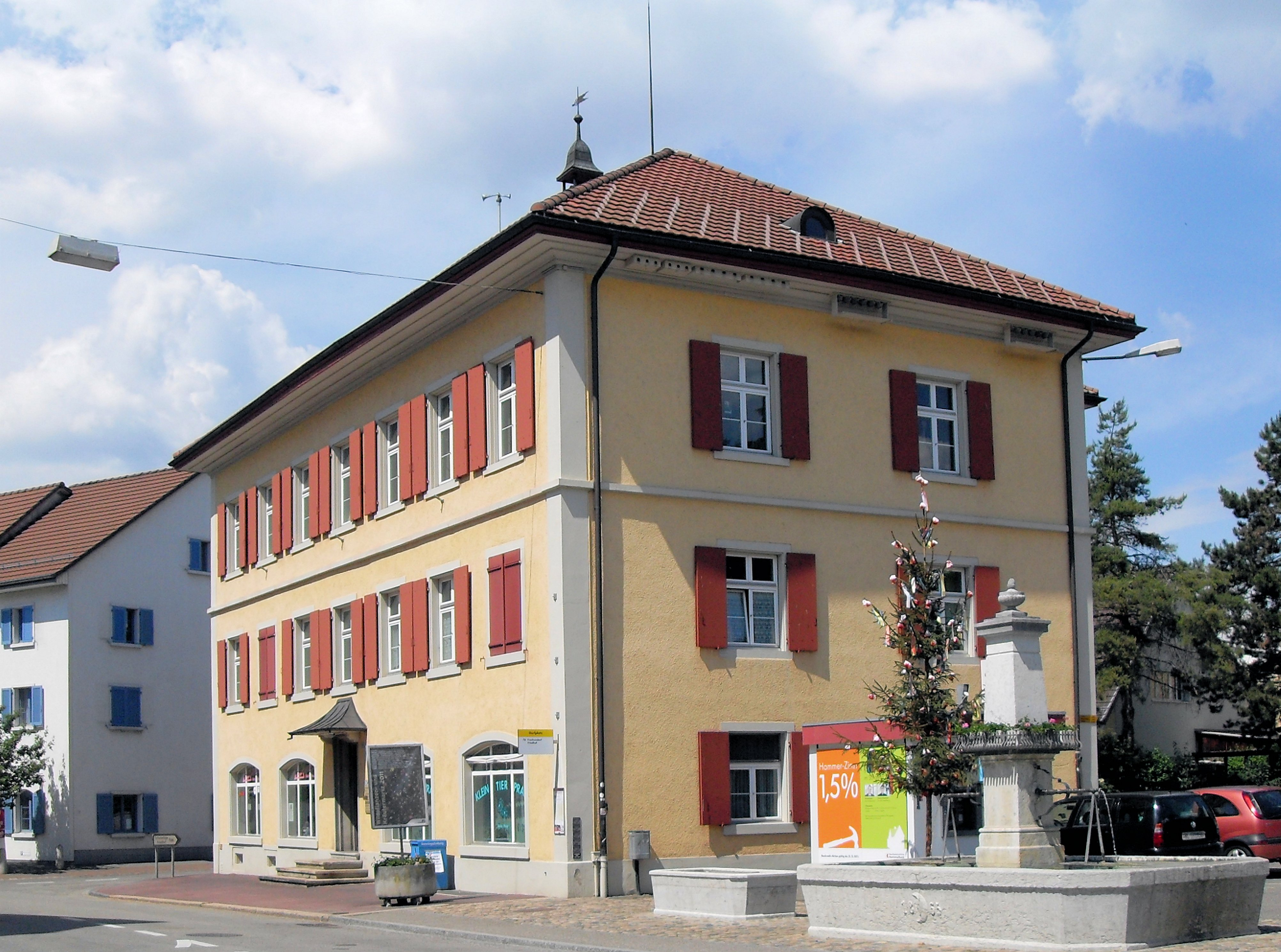 Altes Dorfschulhaus in der Hauptstrasse in Frenkendorf, Kanton Basel-Landschaft, Schweiz